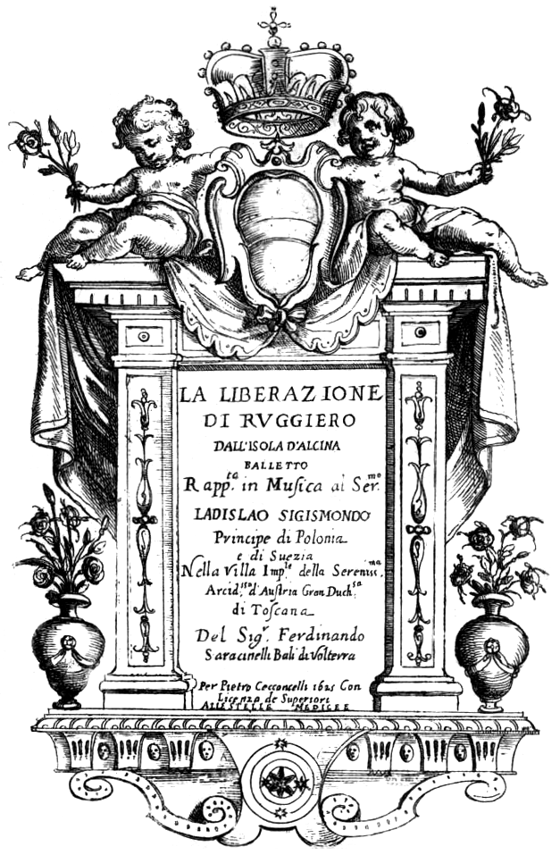 F. Caccini - La liberazione di Ruggiero - title page of the libretto - 1625